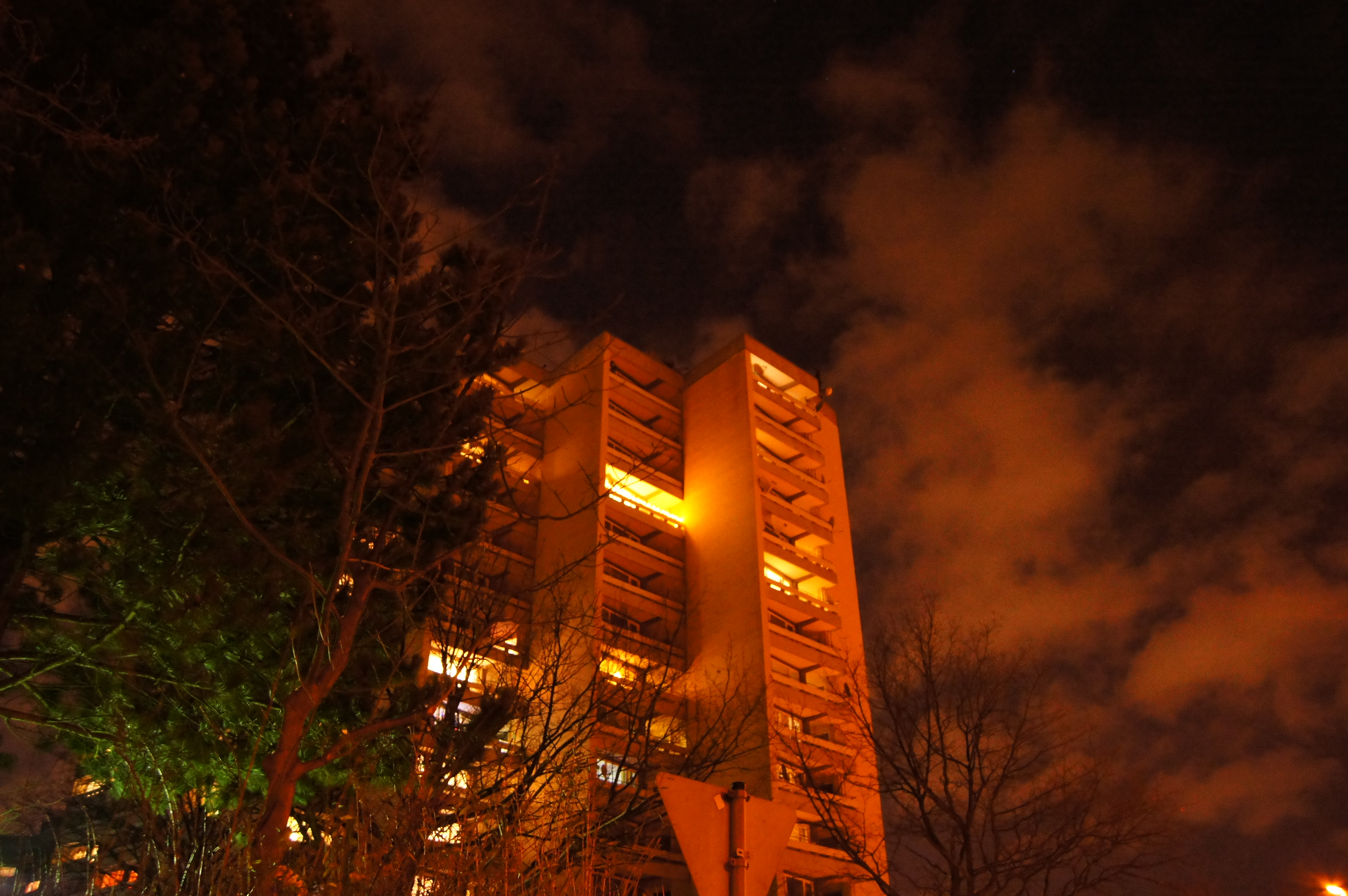 Mühlenberg, Hannover, Germany